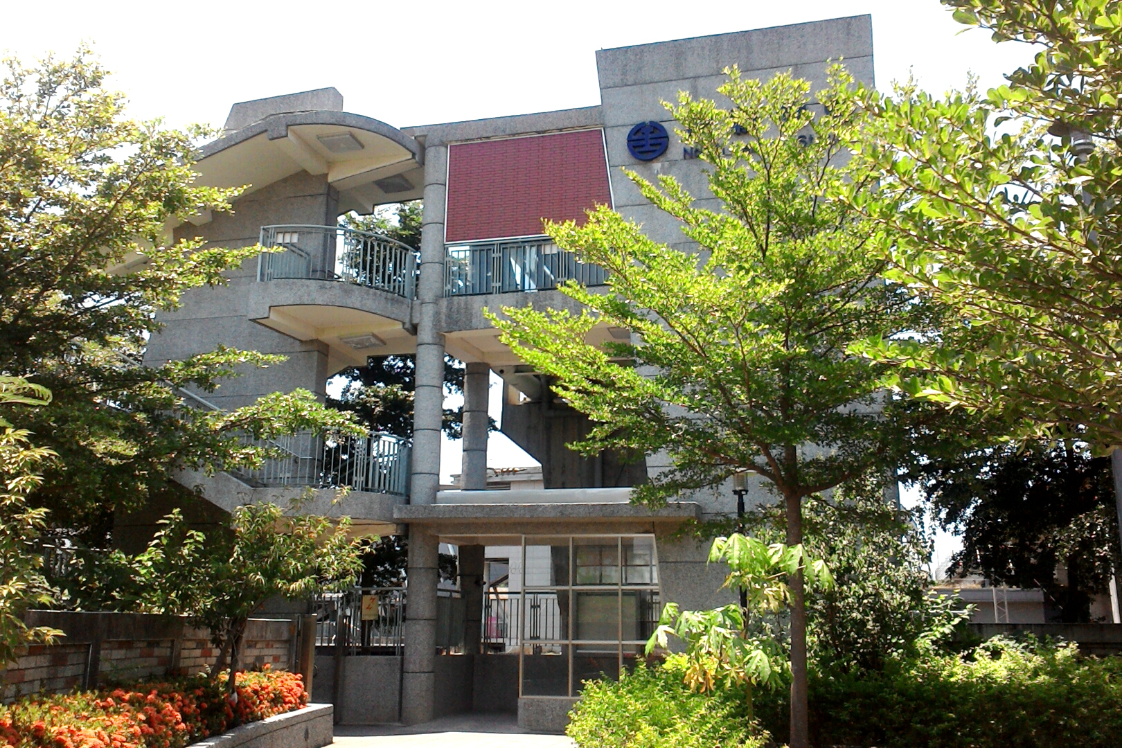 北新竹車站南側出口,台灣省新竹市東區東勢聯里東園里